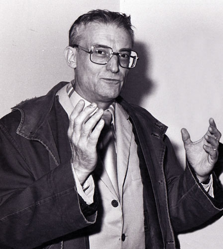 Photo de Jacques Mennessons en 1977